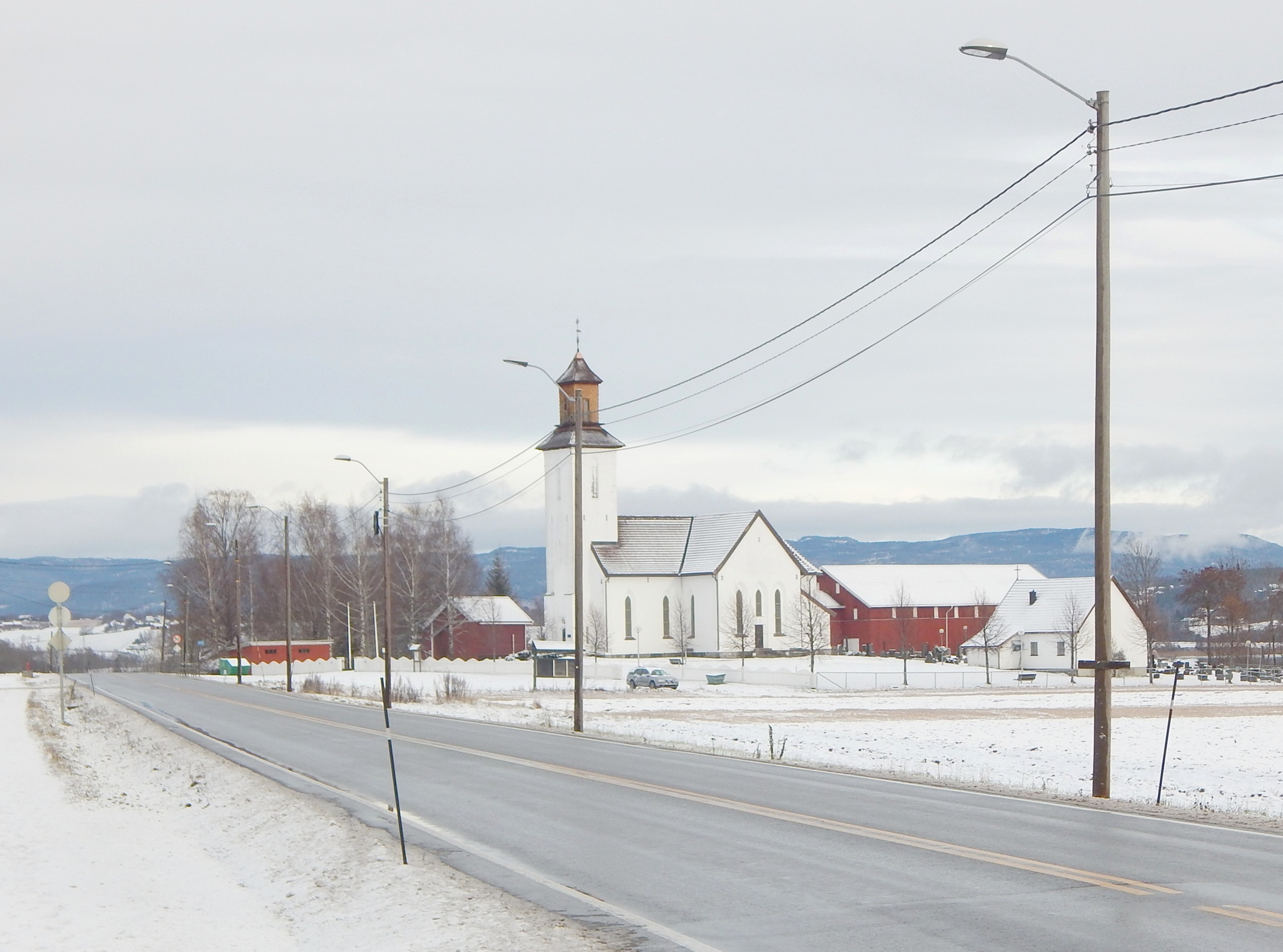 Kongsbergveien (fylkesvei 73) forbi Fiskum nye kirke